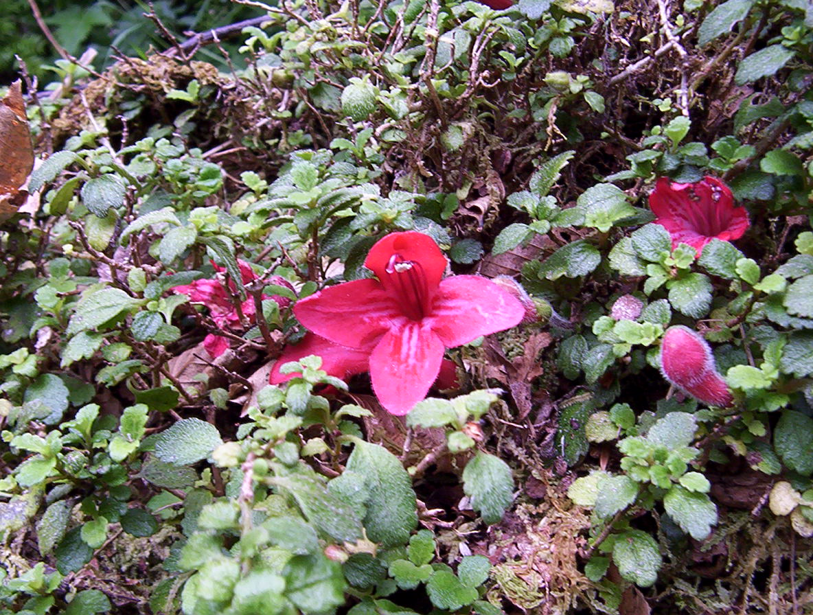 Asteranthera ovata (Estrellita), obtenida en el Predio San Pablo de Tregua, Provincia de Valdivia, Chile